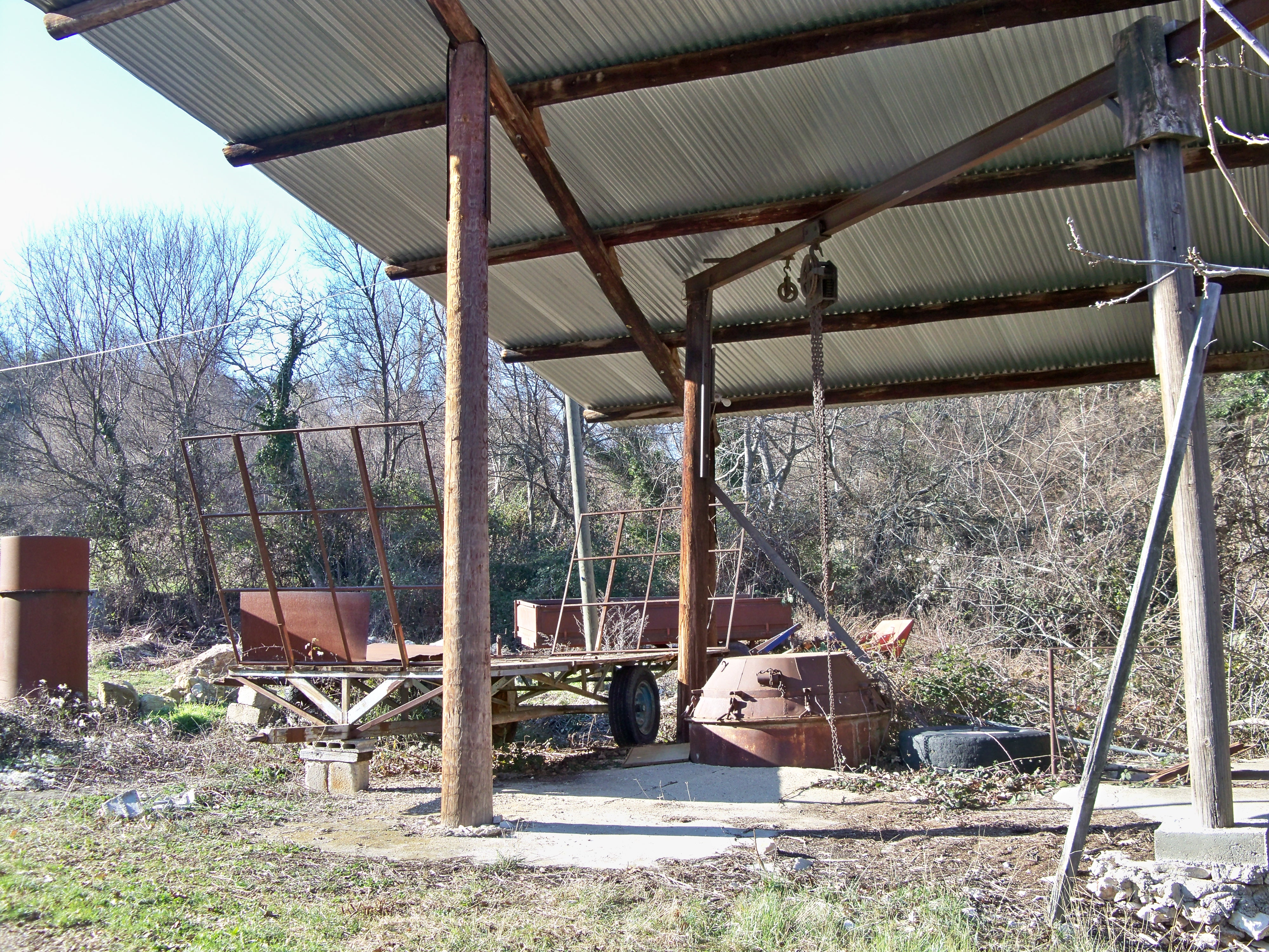 Distillerie de lanvade près du Castellet-en-Lubéron (84), France